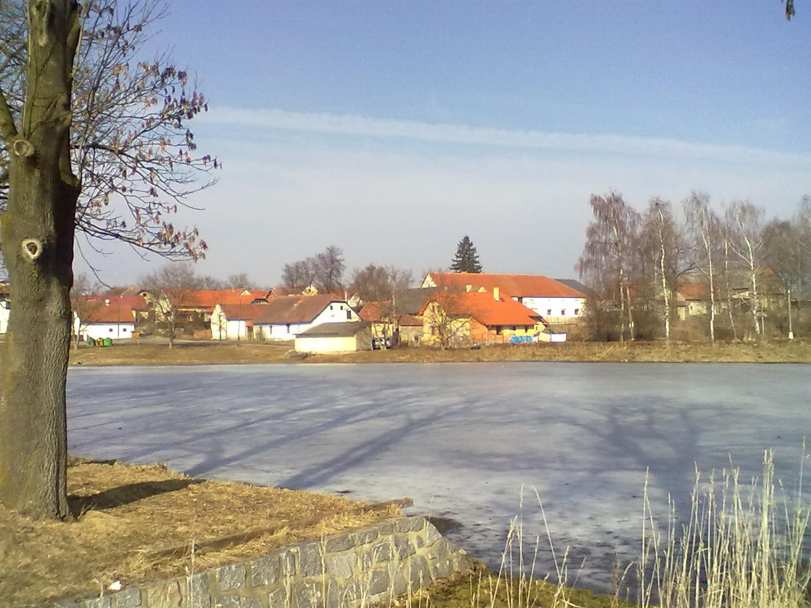 Touškov